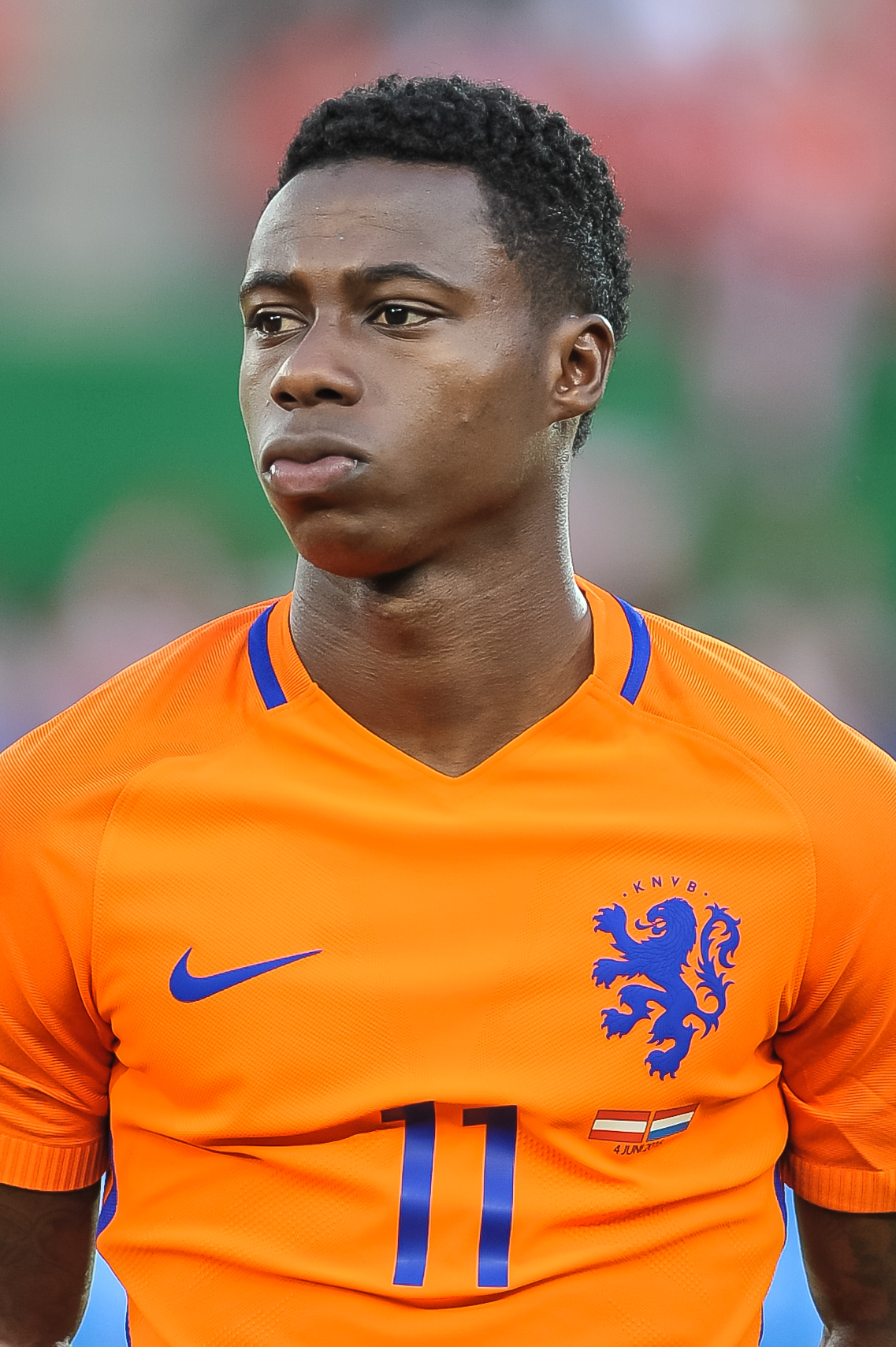 Wien, 4.6.2016, ÖFB Laenderspiel - Österreich vs Niederlande. Bild zeigt Quincy Promes (NED).